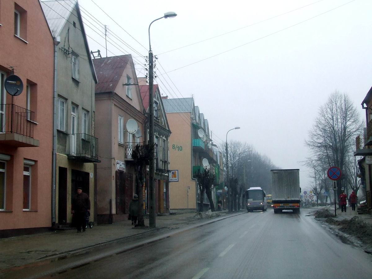 Sokółka, główna ulica